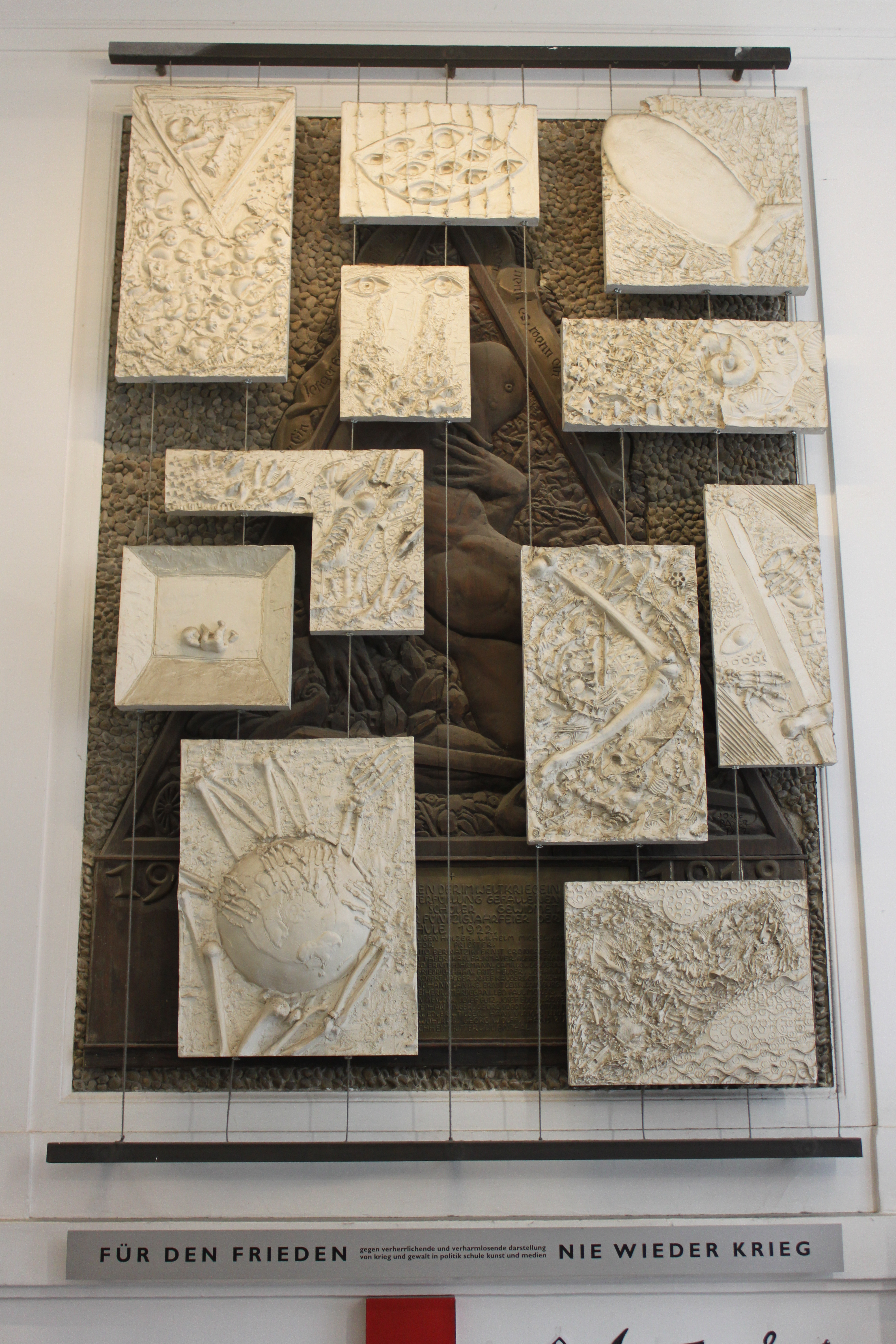 Gymnasium Stubenbastei, Vestibül, rechte Wand, Kriegerdenkmal Erster Weltkrieg von Josef Bayer (1922), teils überdeckt mit Gussformen von Schülern der 6B (2002/2003) im Dialog mit den Bildhauern Stefan Buxbaum und Roman Spiess (2003)